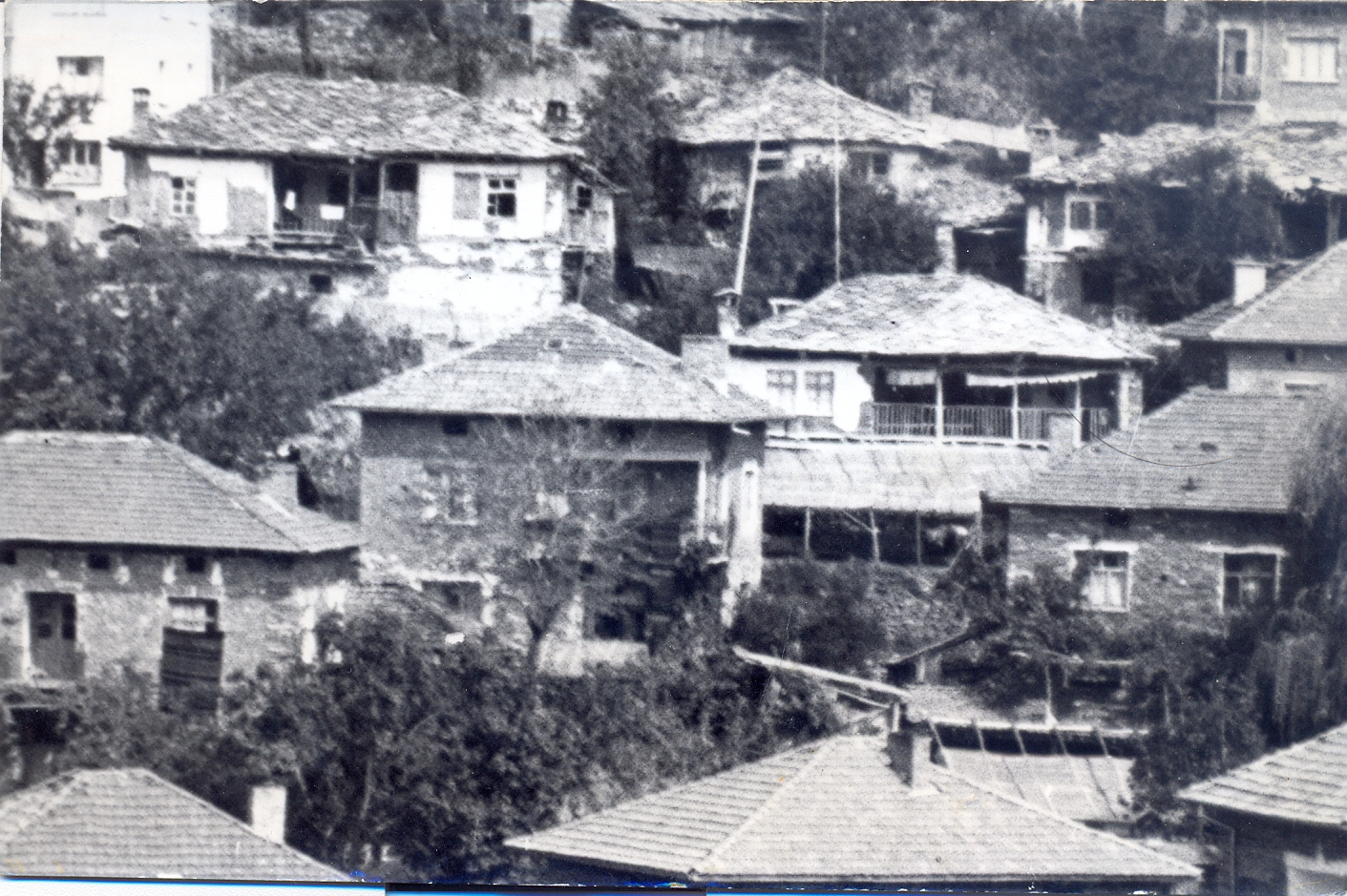 Стари, родопски къщи в село Вълкосел. Снимка от 1978г.